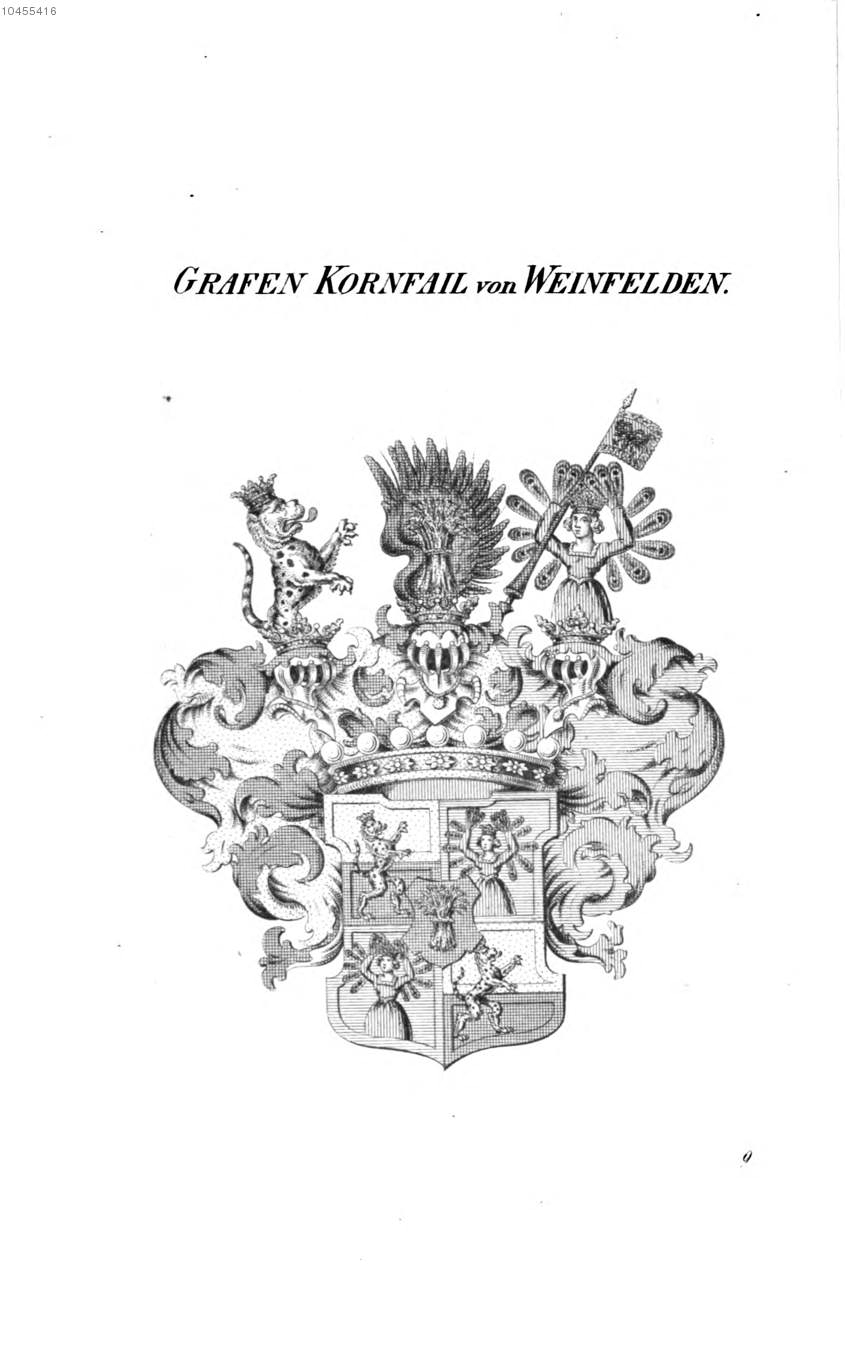 Wappen Kornfail von Weinfelden - Tyroff AT.jpg